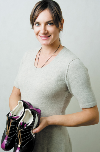 Елена Исинбаева. Двукратная олимпийская чемпионка (2004, 2008), обладательница бронзовой медали Олимпийских игр 2012 года. Многократная чемпионка мира и Европы на открытом воздухе и в помещеии. Обладательница 28 мировых рекордов в прыжках с шестом среди женщин. Заслуженный мастер спорта России. Назначена мэром олимпийской деревни в Сочи. Фотография из серии «Лица эстафеты».